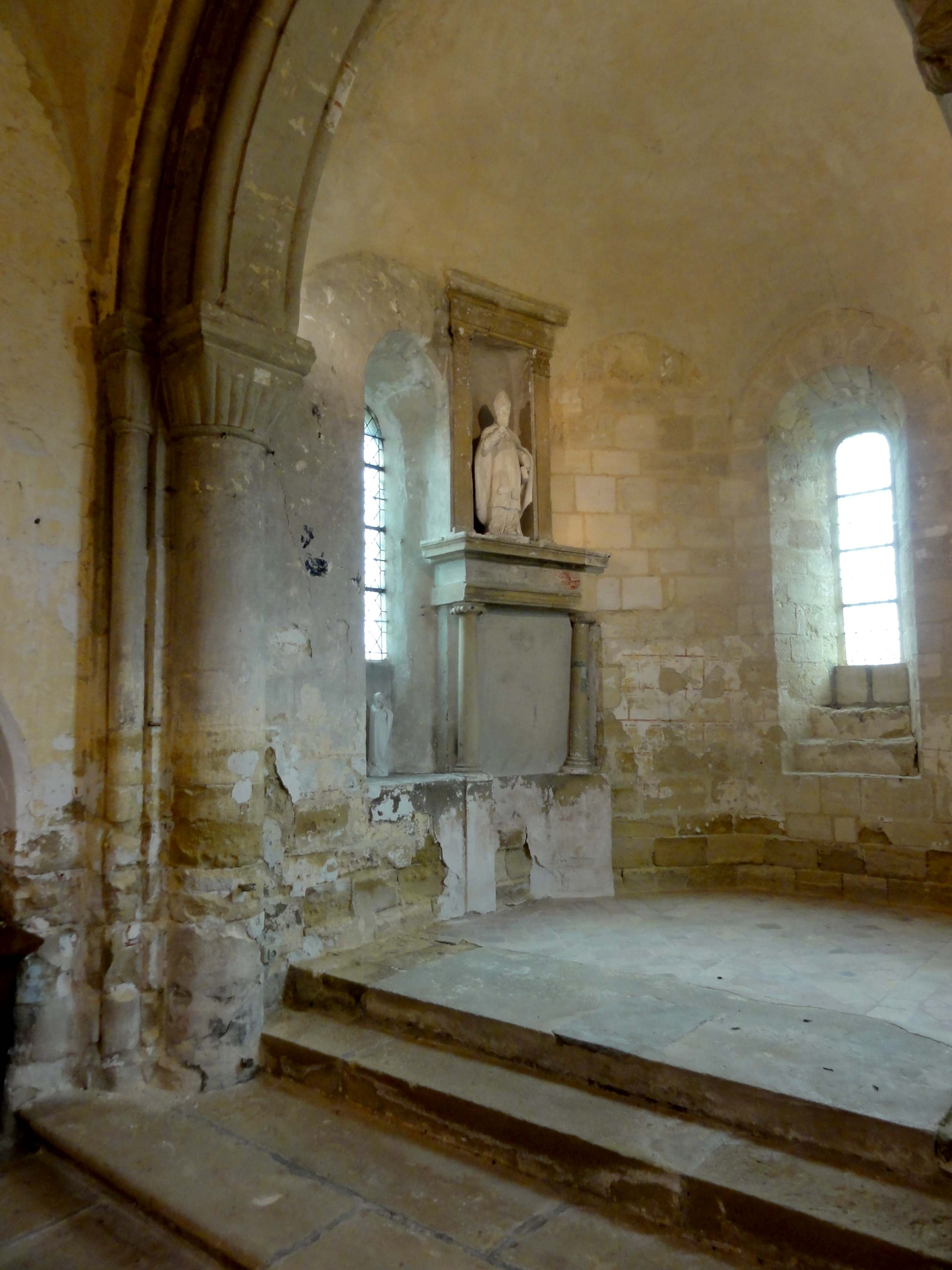 Intérieur de l'église - voir titre.